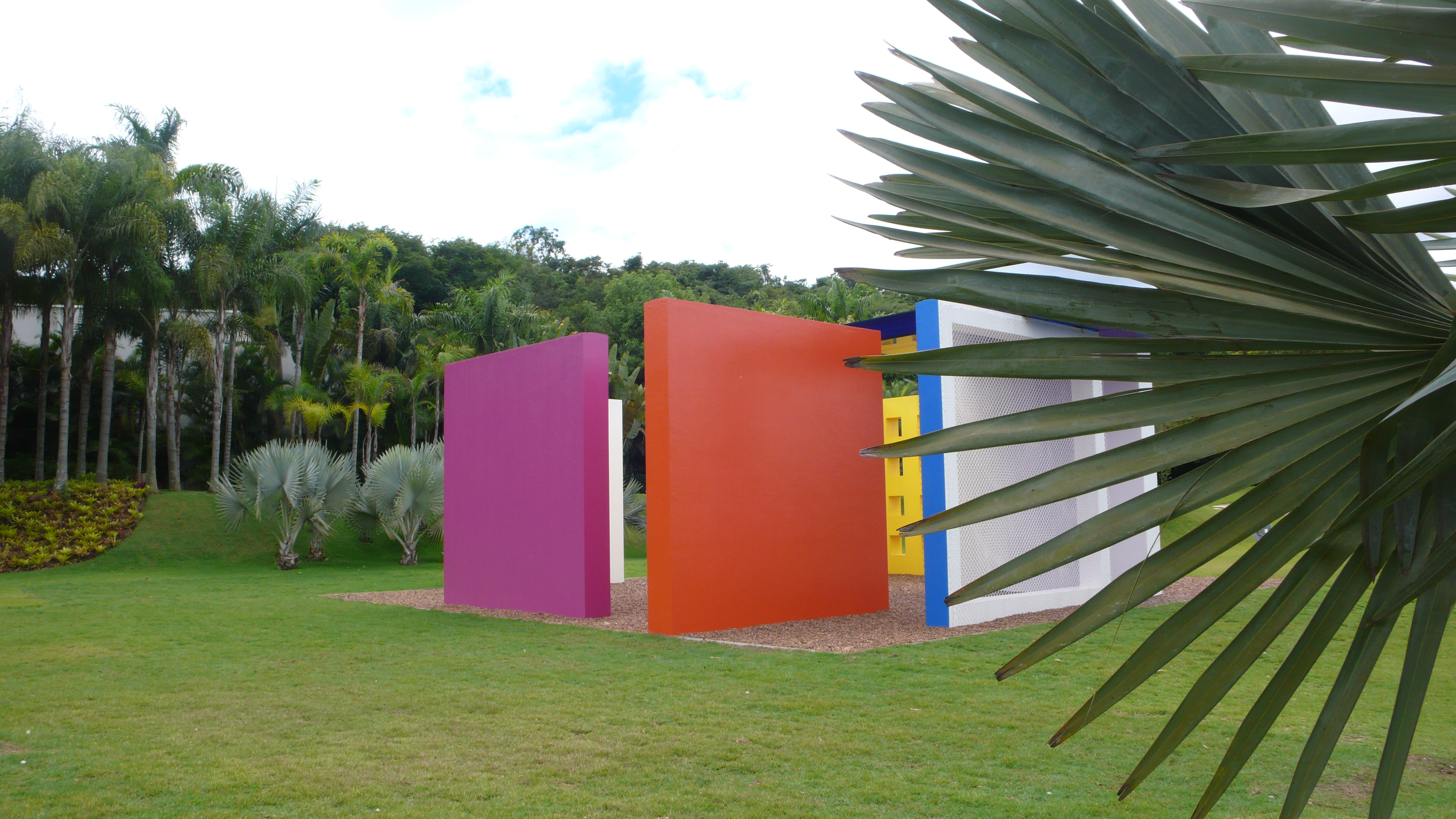 Hélio Oiticica at Inhotim in Brumadinho/Brazil